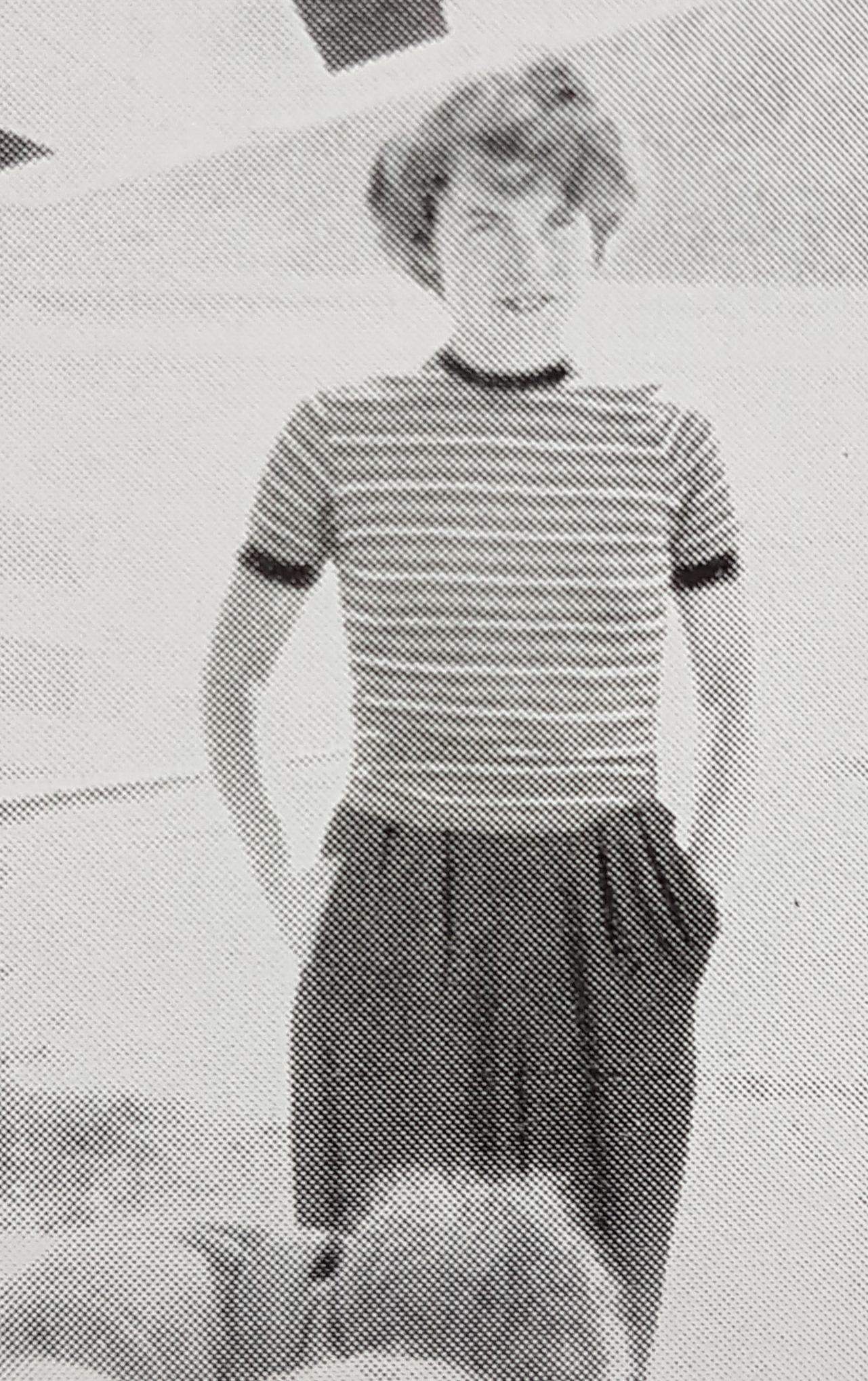 Ann Welch